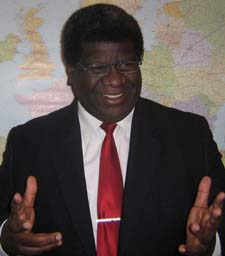 Lester Burton durante una reunión con colegas periodistas en la ciudad de Barcelona, España.